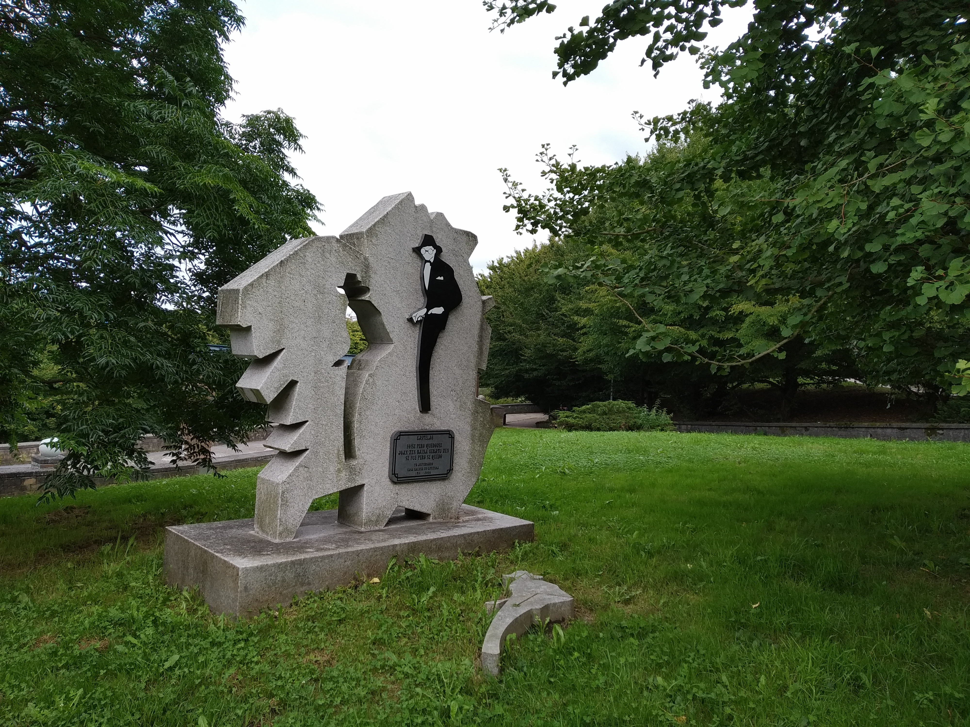 Parke